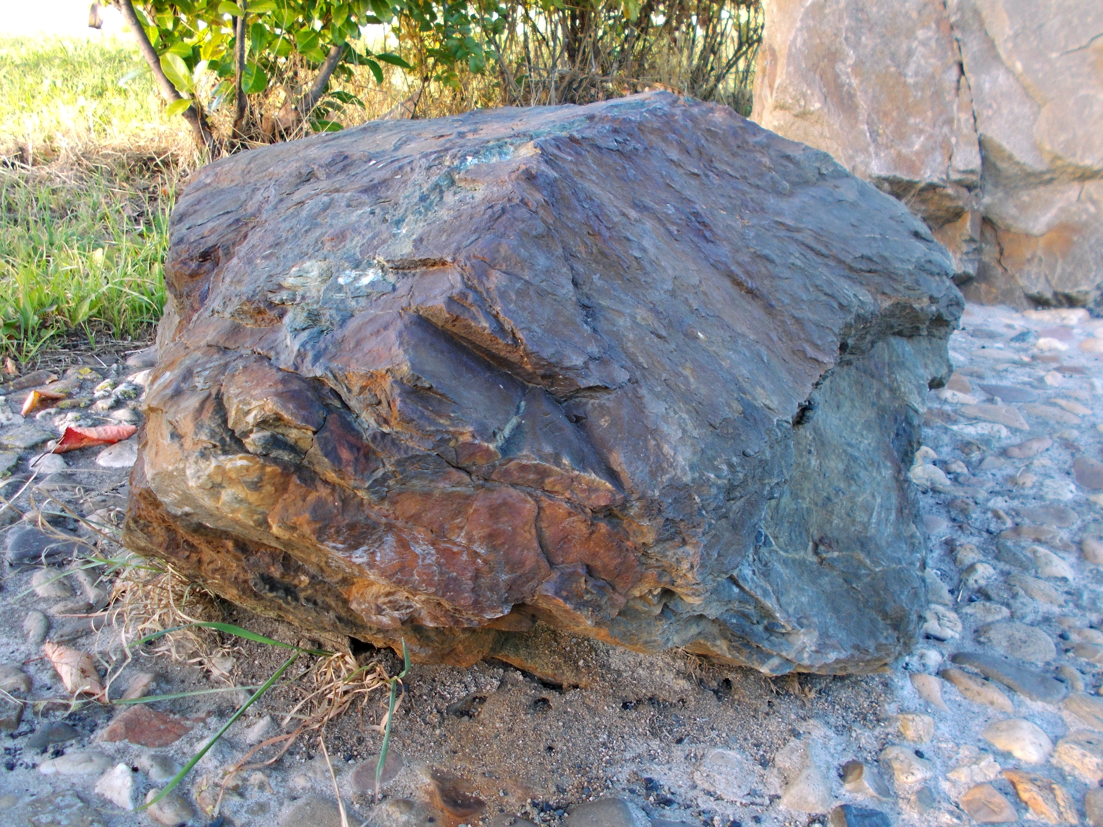 Findlingsweg Sonsbeck Station 9: Phyllitischer Ton- und Schluffstein (Tonschiefer).